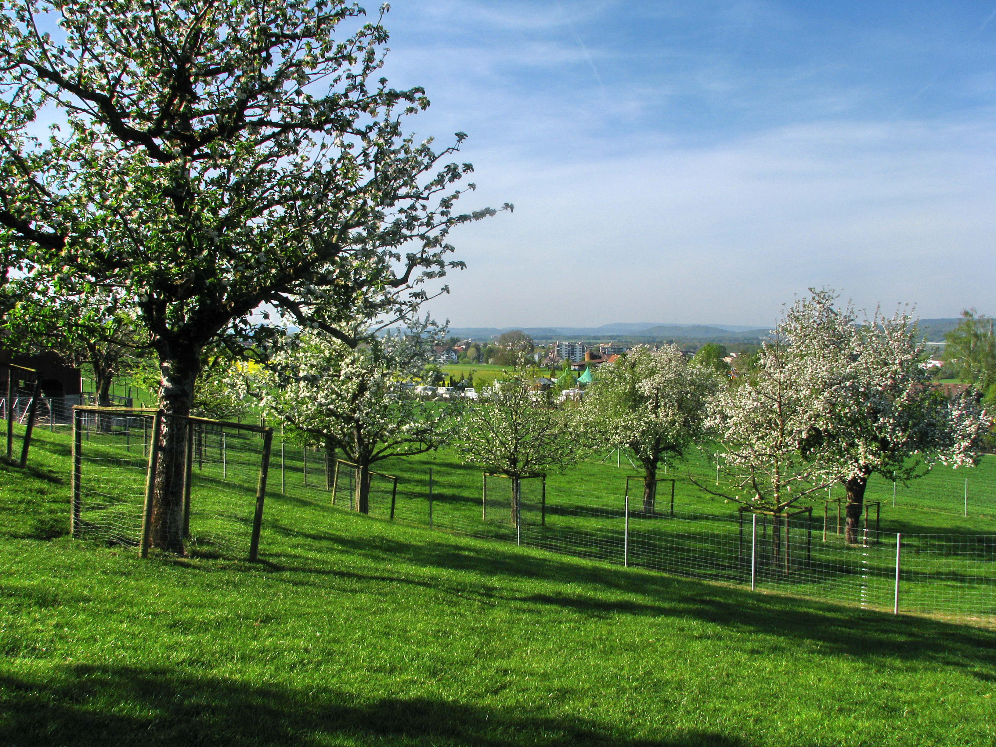 Letten in Rümlang (Switzerland)